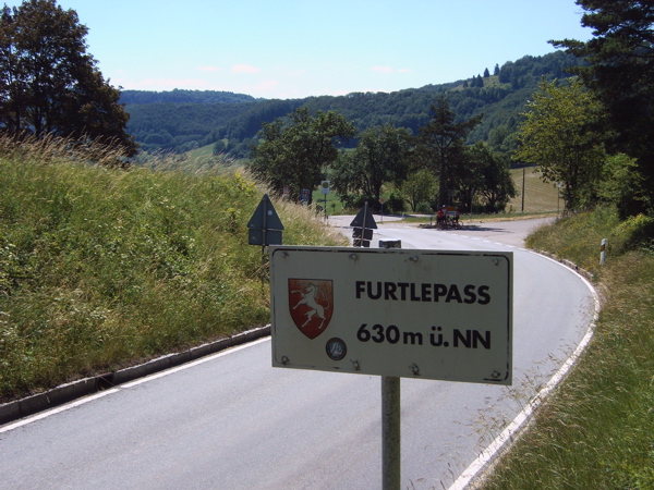 Furtlepass, Schwäbische Alb